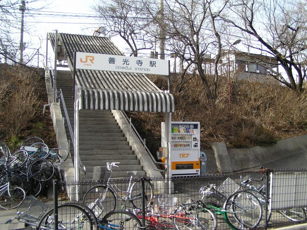 Zenkōji Station, Kōfu, Yamanashi, Japan